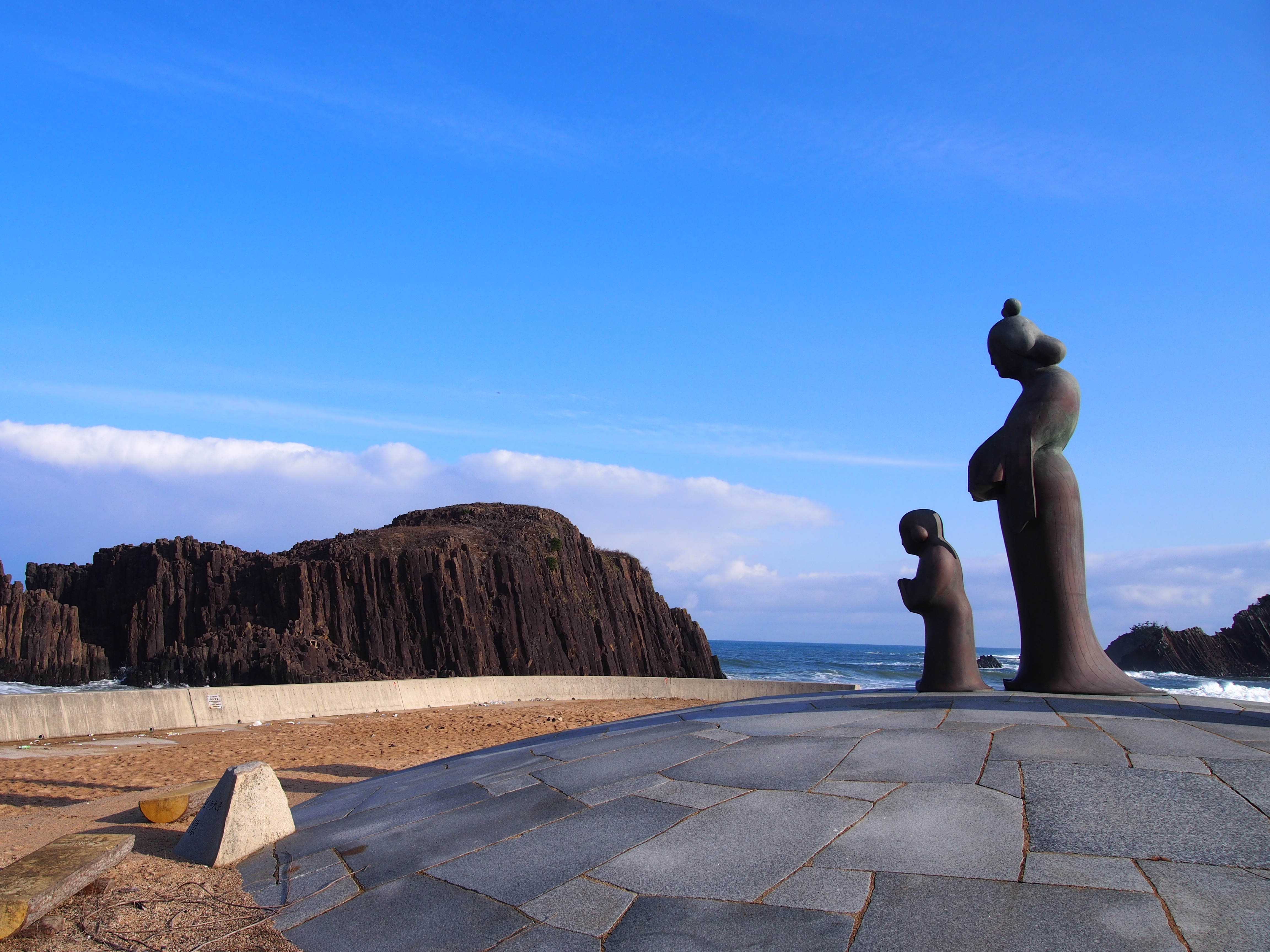 間人皇后・聖徳太子母子像（京都府京丹後市丹後町間人） 右側奥は立岩